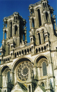 eigen foto 2004